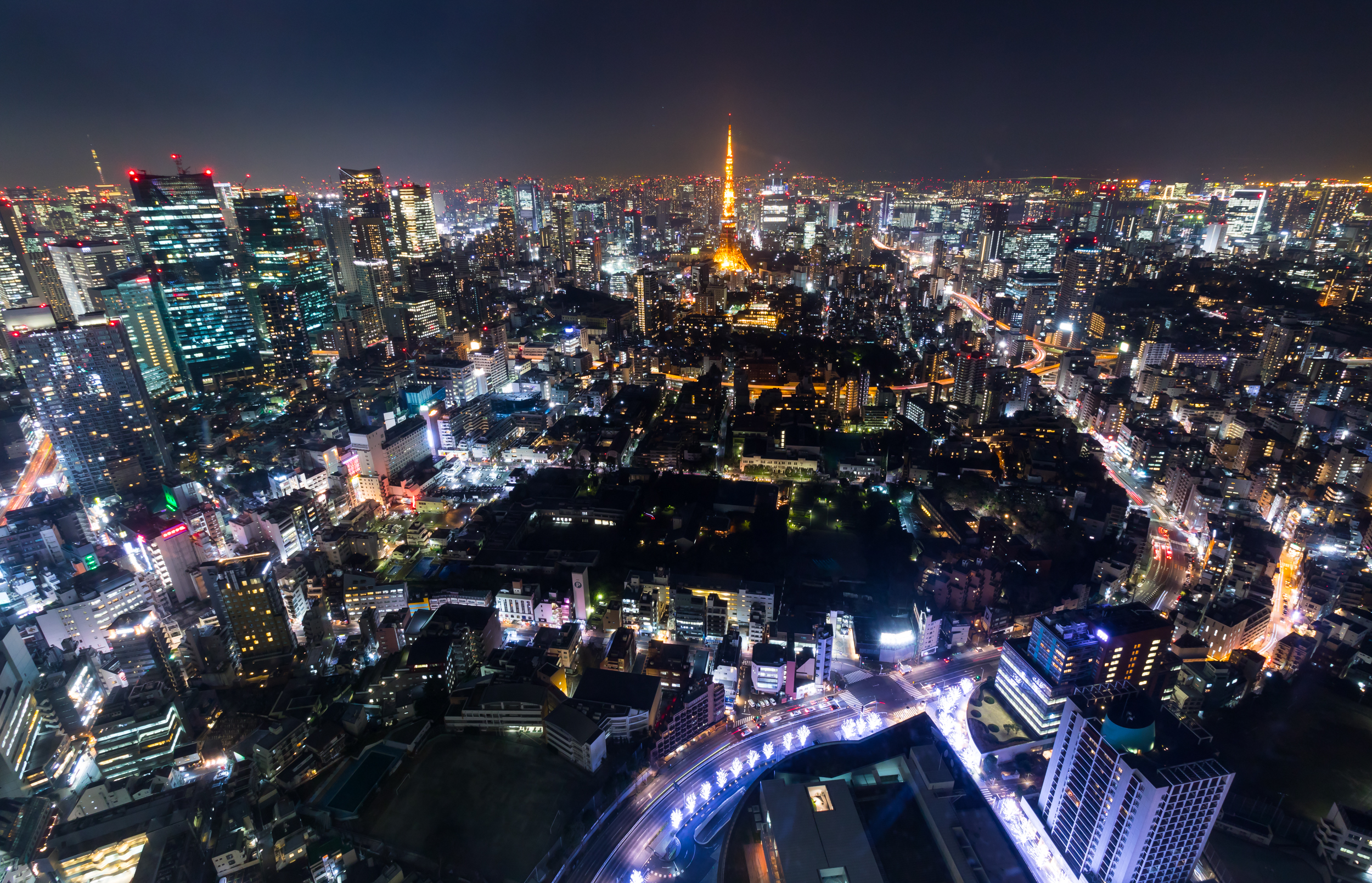 六本木ヒルズ森タワーからの夜景